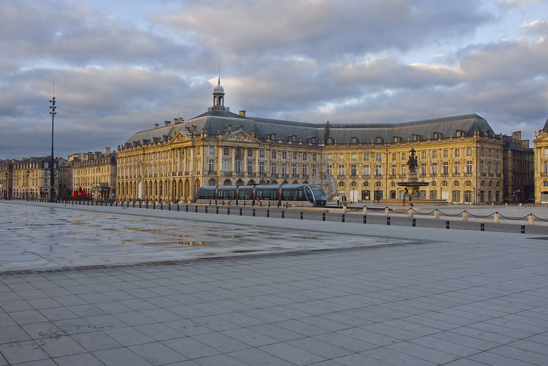 Le musée national des Douanes à Bordeaux, vue d'ensemble, élévations sur quai de la Douane et place de la Bourse, commune de Bordeaux, Gironde, France, Europe. .